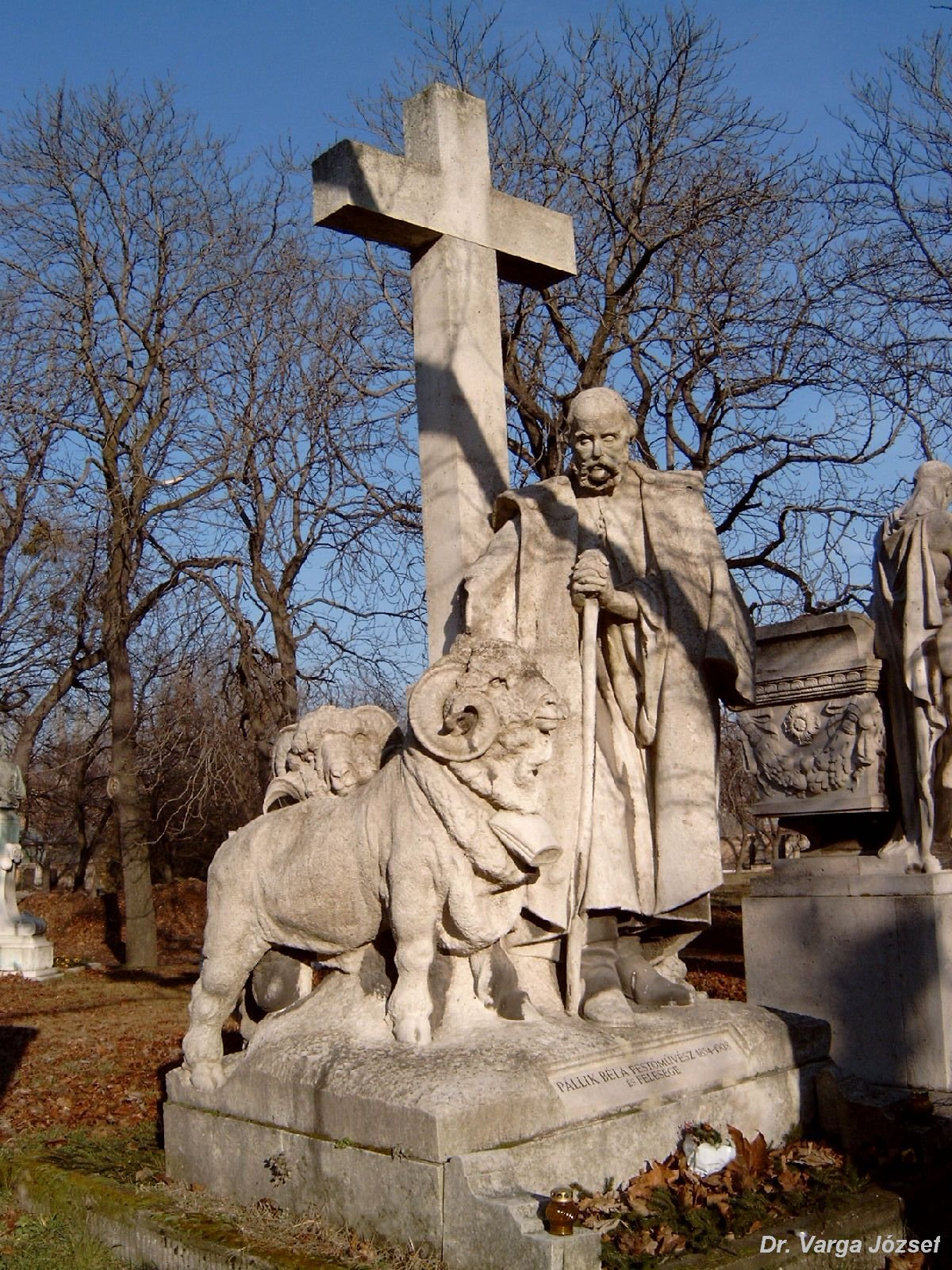 Pállik Bélla sírja Budapesten. Kerepesi temető: 34-2-55, ifj Vastagh György alkotása